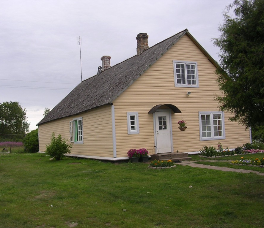 Unukse küla